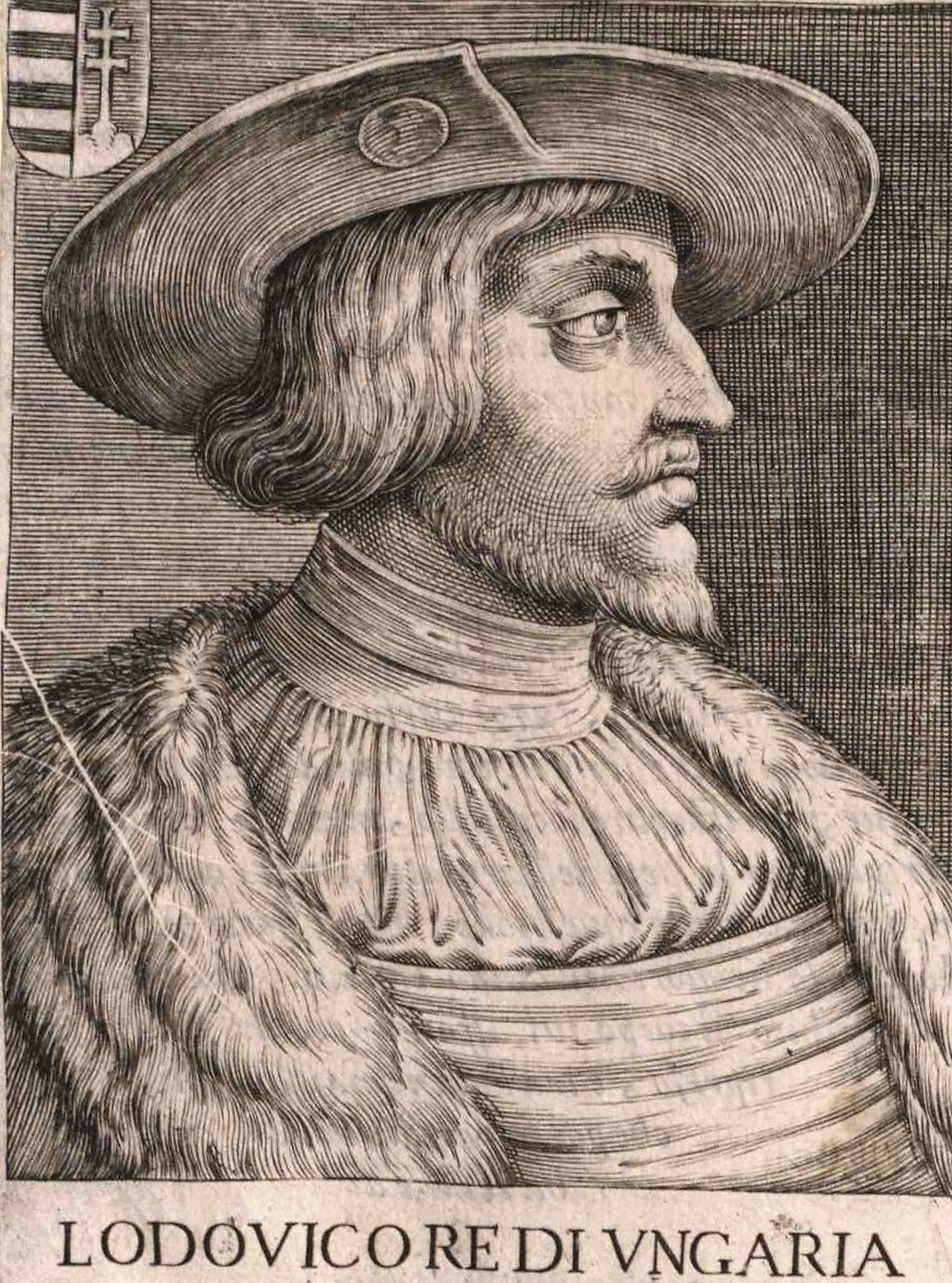 Ludwig II., König von Ungarn (1506 - 1526)